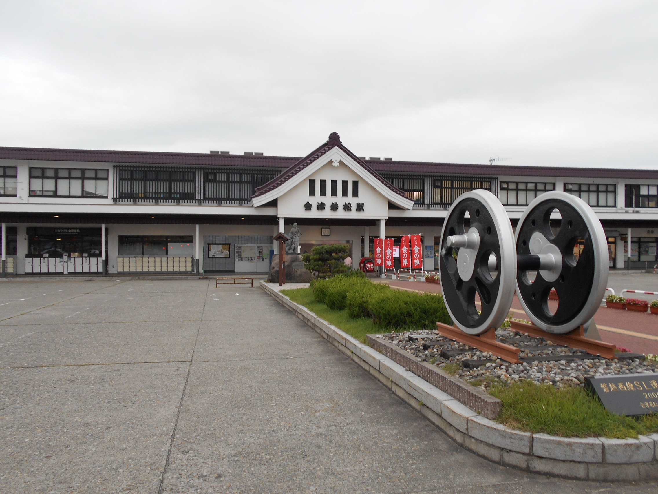 JR東日本 会津若松駅